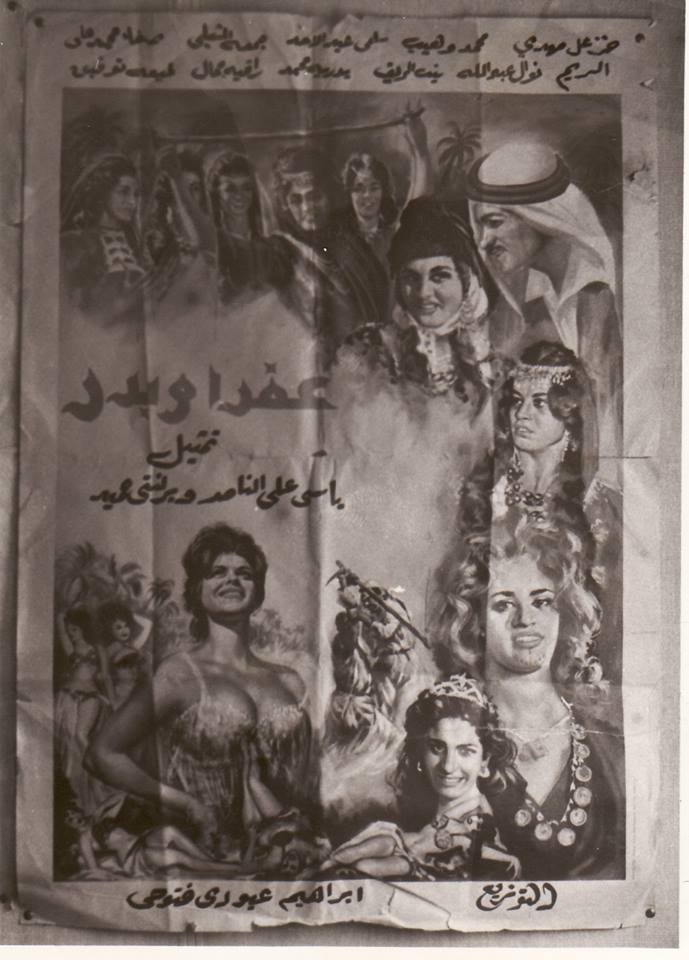 أفيش فيلم عفرة وبدر